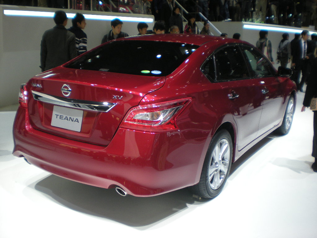 日産・ティアナ